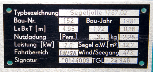 Typenschild der Yoxy.